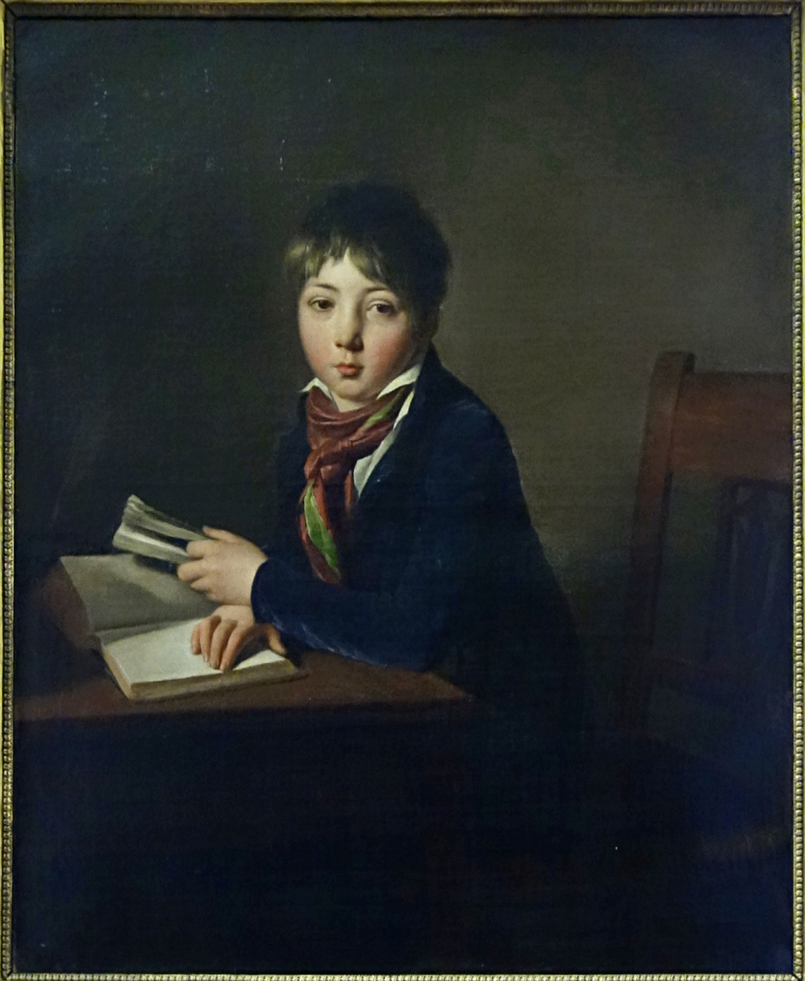 Portrait de Julien Boilly, enfant (1796-1874), au palais des beaux-arts de Lille.